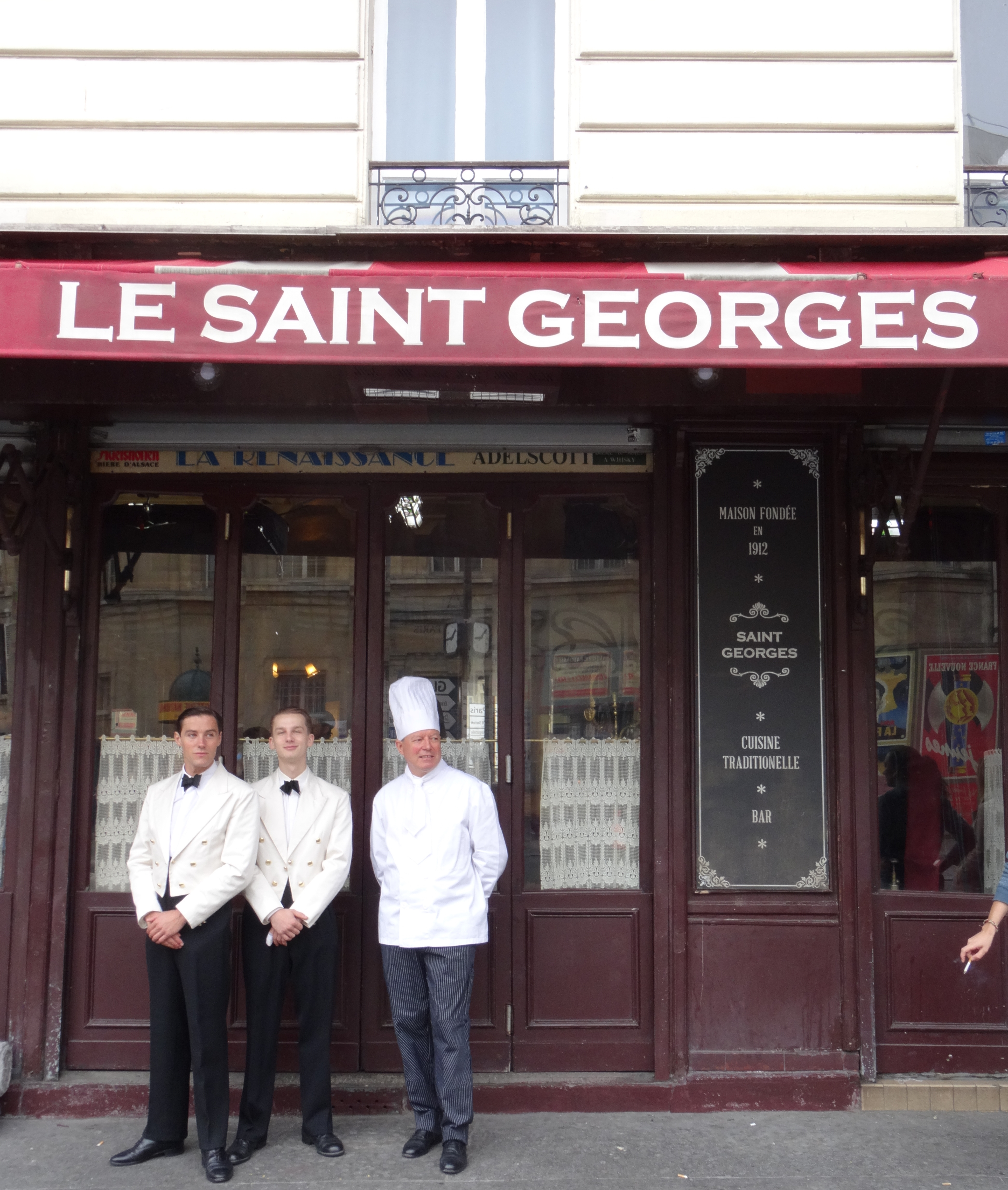 Tournage de la Douleur, un film d'Emmanuel Finkiel, à Paris, octobre 2016, dans le 18e arrondissement de Paris (la Douleur, livre de Marguerite Duras). La Renaissance, 112 Rue Championnet, 75018 Paris, France.